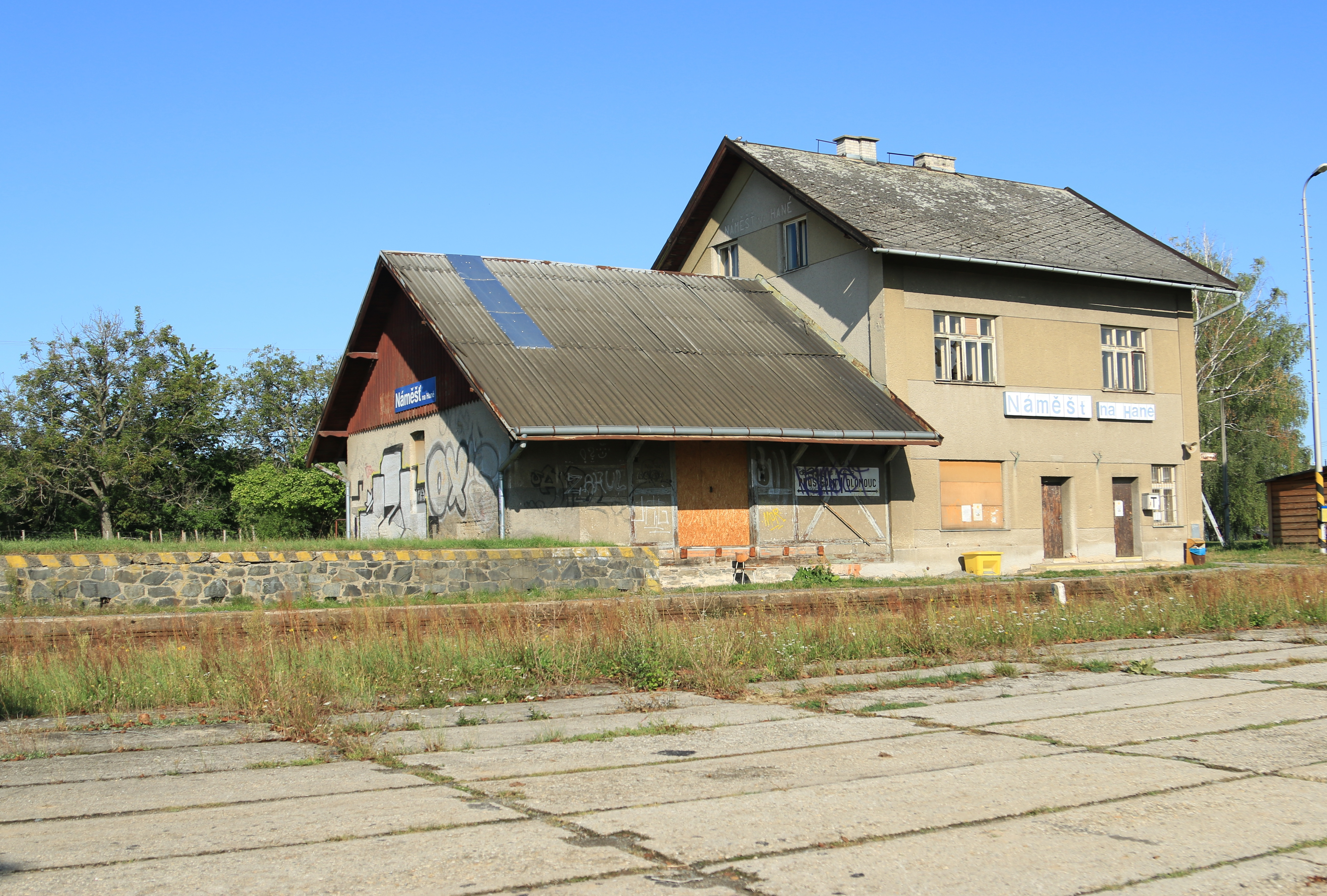 nádražní budova v Náměšti na Hané